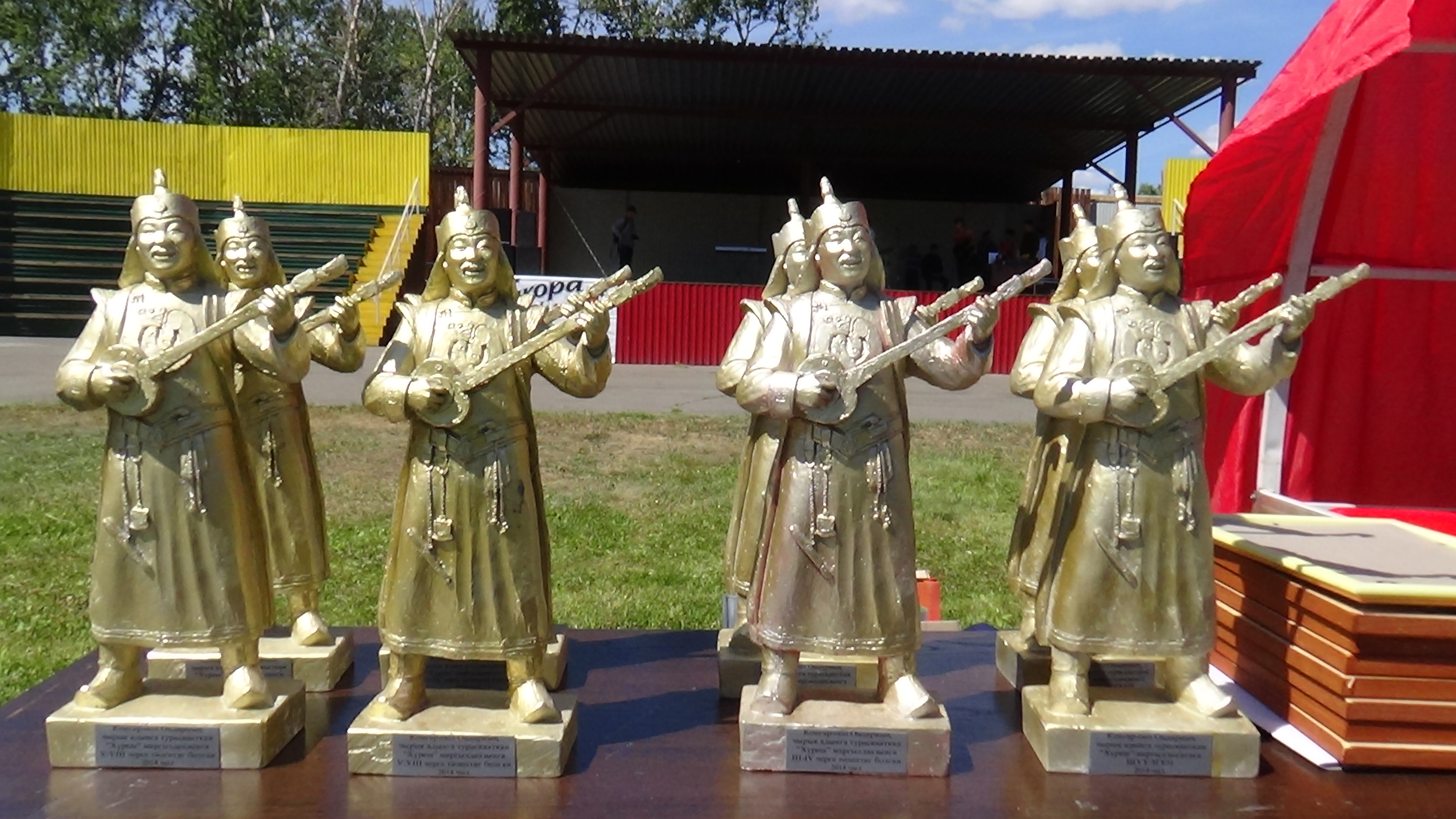 Тыва дыл: Ондар Коңгар-оол Борис-оглунга тураскааткан тураскаалдың бичии дүрзүлери. 10.08.2014ч. "Хүреш" стадионунга Ондар Коңгар-оолга тураскааткан хүреш мөөрейинге шаңналдыг черлерге кирген мөгелерге ук дүрзүлерни белек кылдыр белеткээн.